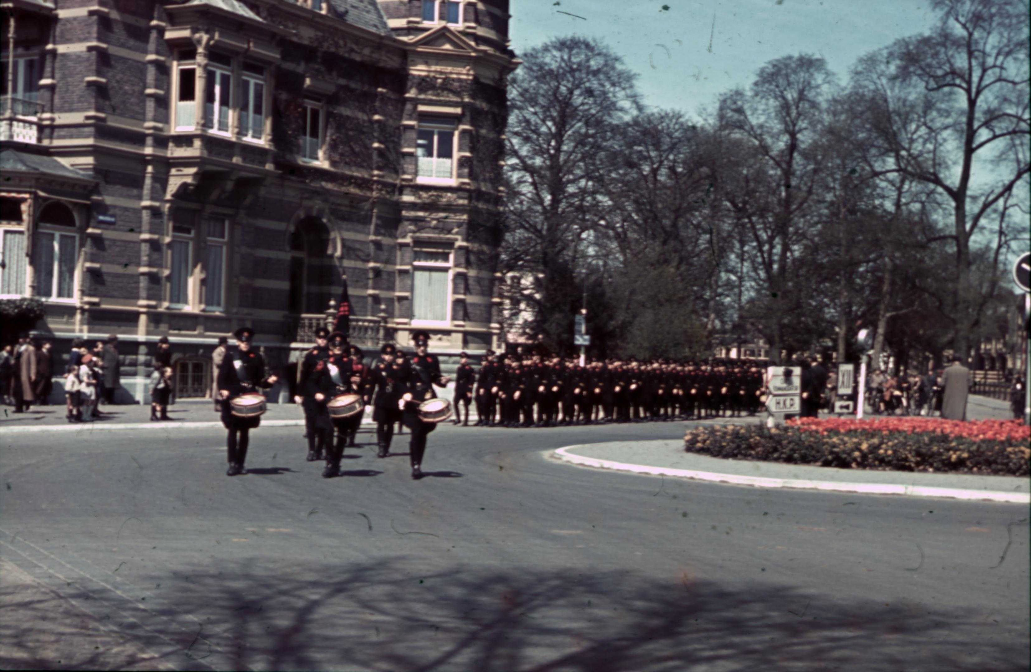 Parade van de WA richting de Maliebaan te Utrecht. Deze foto is afkomstig uit het archief van de Fotodienst der NSB.